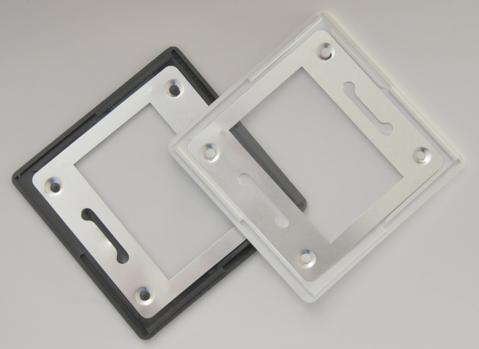 Ein Paar Gepe-Diarähmchen, sie ergeben, zusammengedrückt mit innenliegendem Dia, das projektionsfertige Diarähmchen